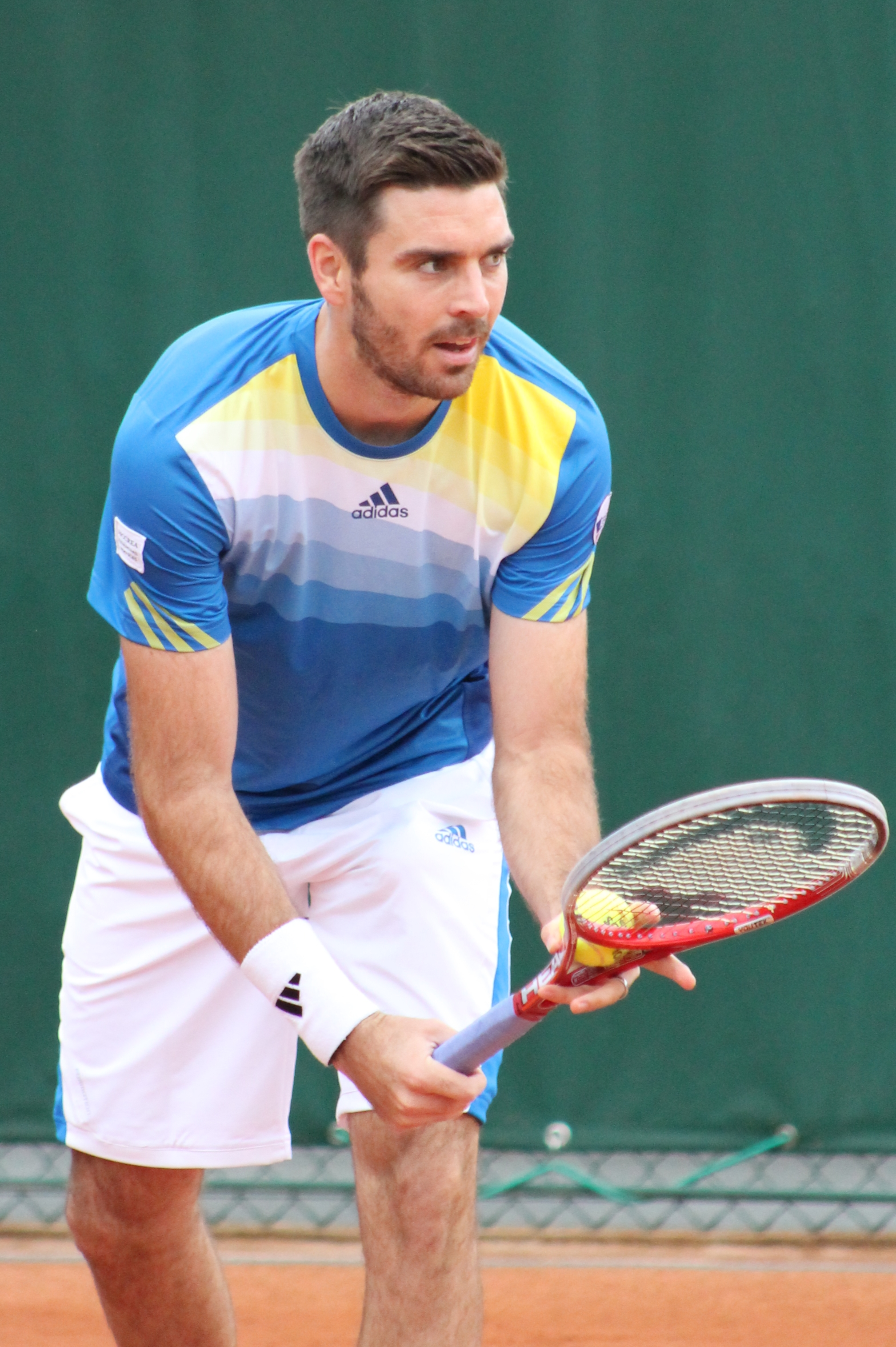 Fleming RG13 (12)